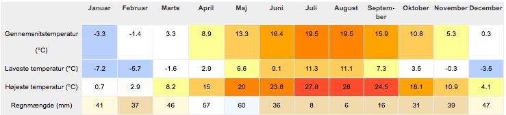 Klima for Sivas